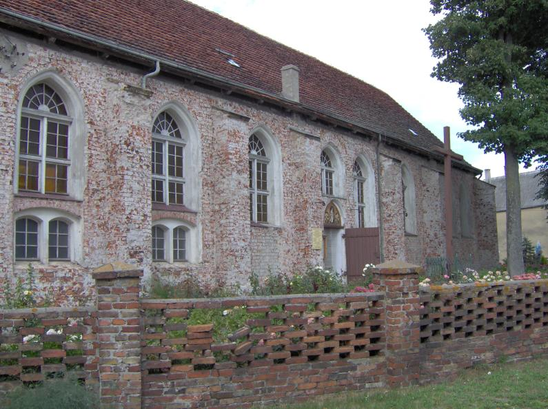 Nawa boczna kościoła w Nowym Warpnie. Autor: Maks Saczywko (Soczewa)